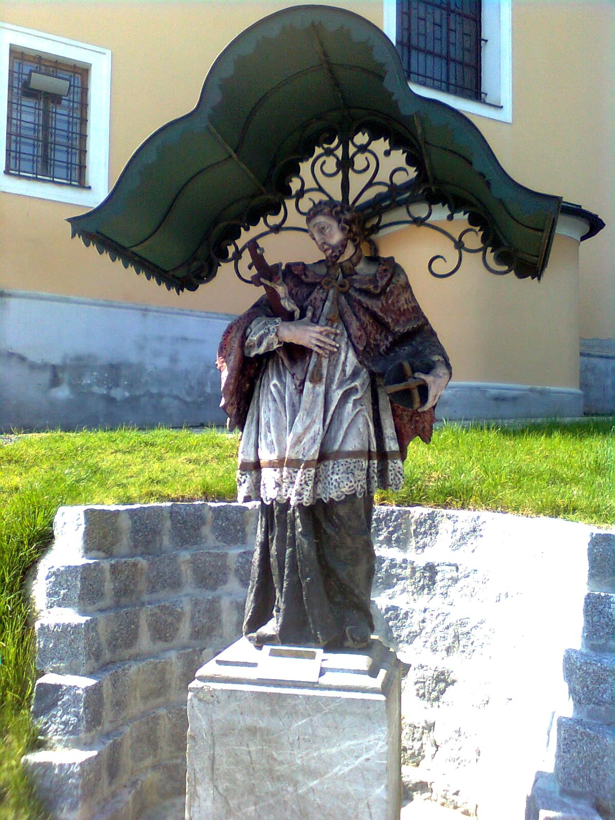 Denkmalgeschützte Statue des heiligen Johannes Nepomuk vor der Pfarrkirche Nestelbach bei Graz